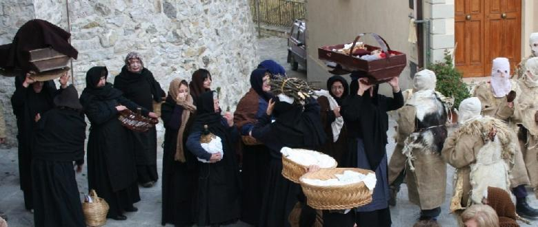 Autore: Fonte: Descrizione: Quaresime Licenza d'uso: libera Note: nessuna